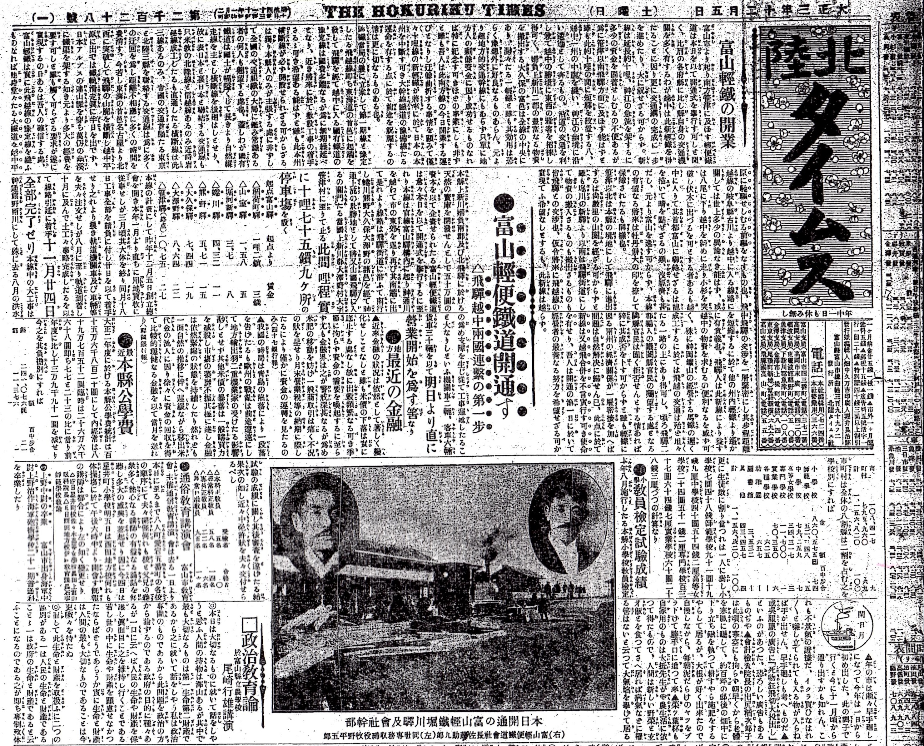 富山軽便鉄道開通を報ずる北陸タイムス